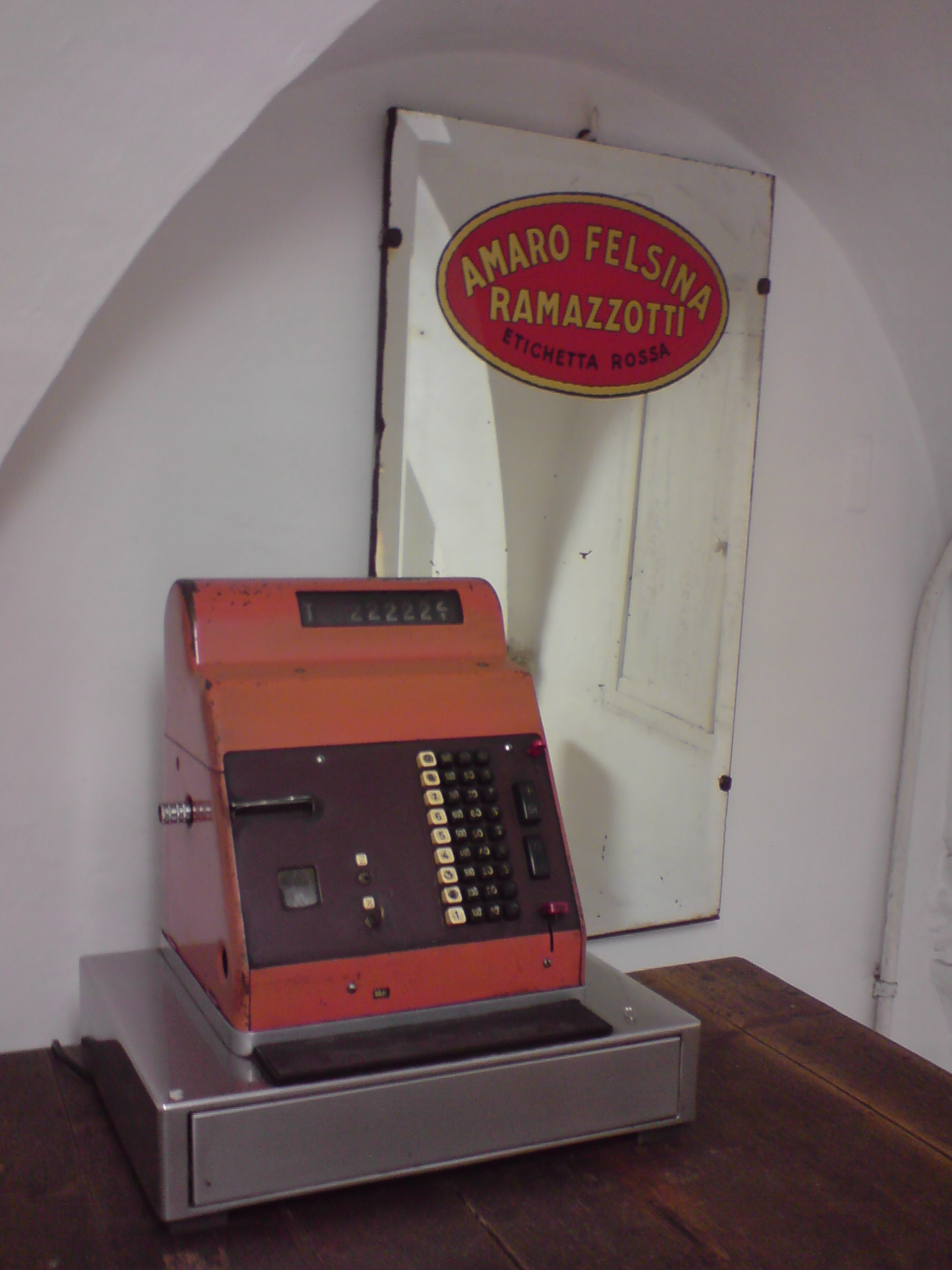 Registratore di cassa e pubblicità della Ramazzotti (nella soffitta di un bar a Campo de' Fiori in Roma - Italia.